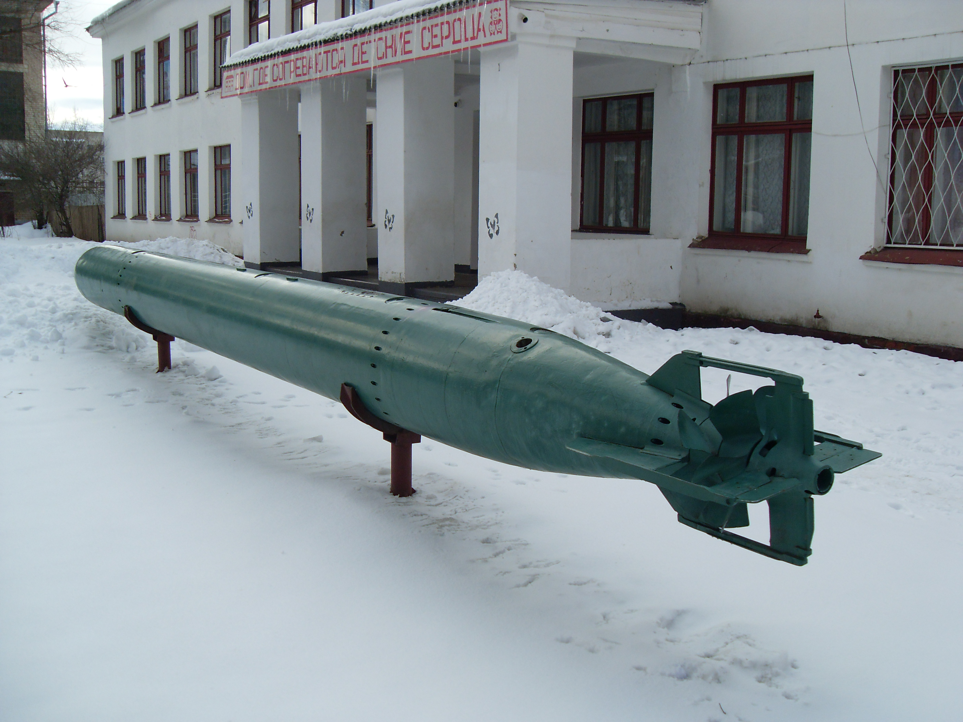 Торпеда, расположенная рядом с памятником Н.Г.Кузнецову